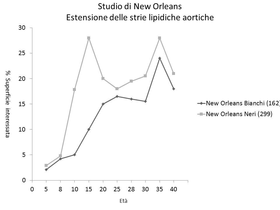 Studio New Orleans.Strie lipidiche aortiche. L’estensione delle strie lipidiche aortiche è maggiore nella razza nera rispetto a quella bianca e nei maschi rispetto alle femmine. L’effetto della pubertà sulla crescita delle fatty streaks è più intenso e precoce nella razza nera. Solo nella razza nera si nota una netta diminuzione dell’estensione tra i 13 e i 23 anni, la cui interpretazione rimane oscura (regressione delle strie?).